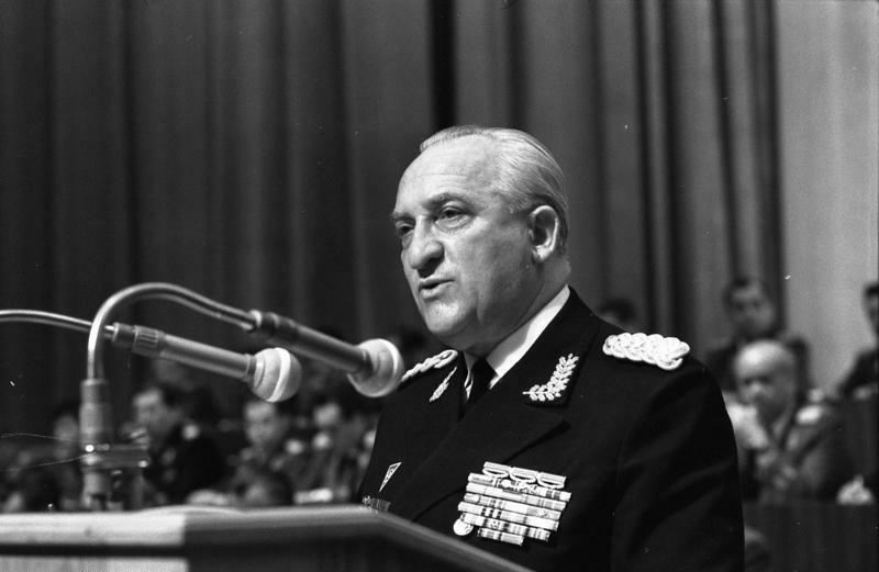 SED-Delegiertenkonferenz, Waldemar Verner Zentralbild / Koard/ 22.5.1971 Dresden: SED-Delegiertenkonferenz der NVA Auf der VIII. Delegiertenkonferenz der Parteiorganisation der SED in der NVA, die am 22. Mai 1971 im Dresdner Kulturpalast begann, erstattete das Mitglied des ZK der SED Admiral Waldemar Verner den Bericht des Sekretärs der Politischen Hauptverwaltung der NVA. Abgebildete Personen: Verner, Waldemar: Stellvertretender Minister für Verteidigung, Vizeadmiral, Chef der Politischen Hauptverwaltung der NVA, Zentralkomitee der SED, DDR